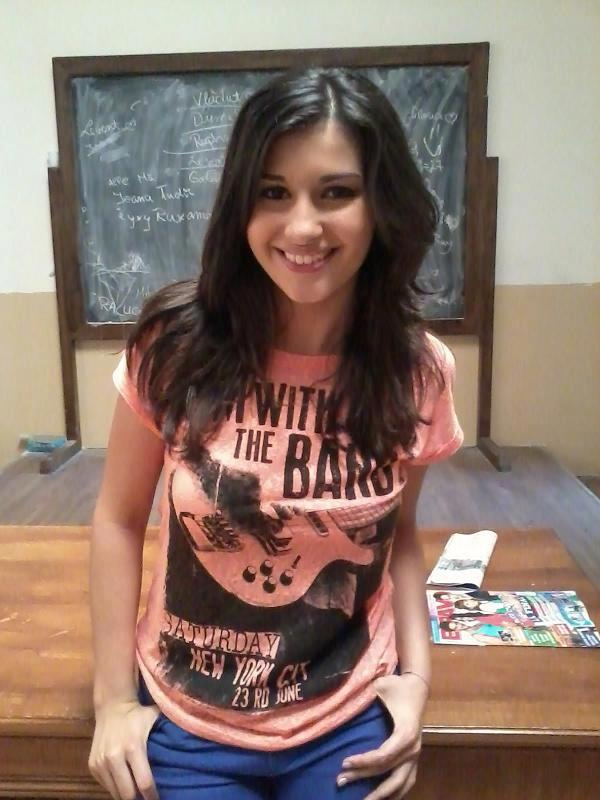 Alina Eremia în timpul filmărilor pentru Pariu cu viaţa